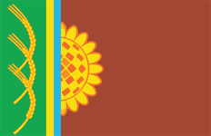 Прапор Широківського району